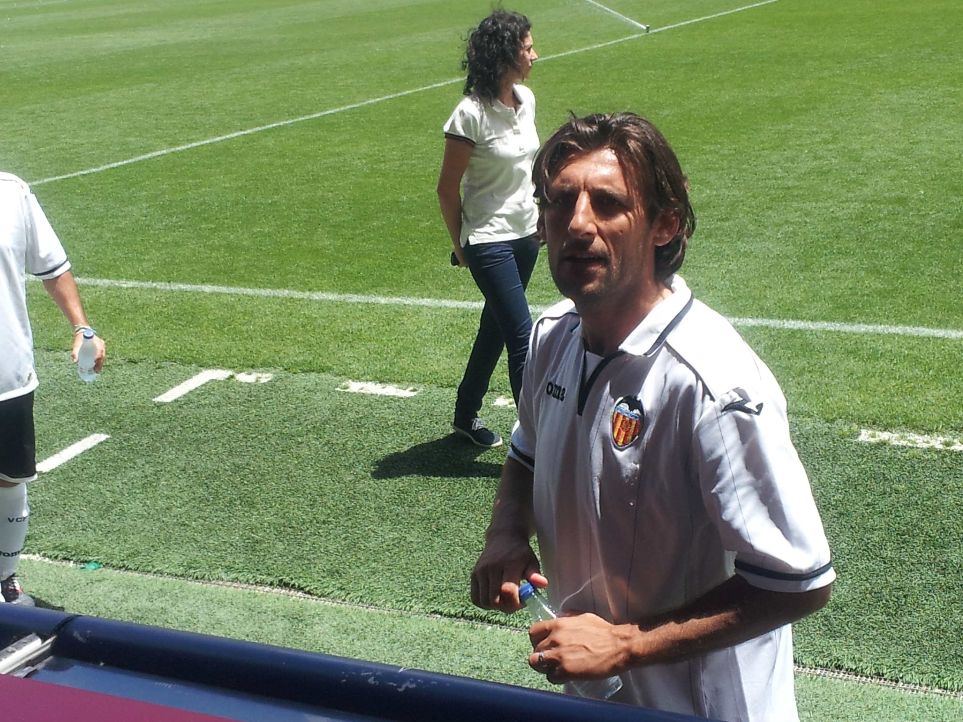 Angulo, al final del partit, s'acostà a la grada per a parlar amb el públic.